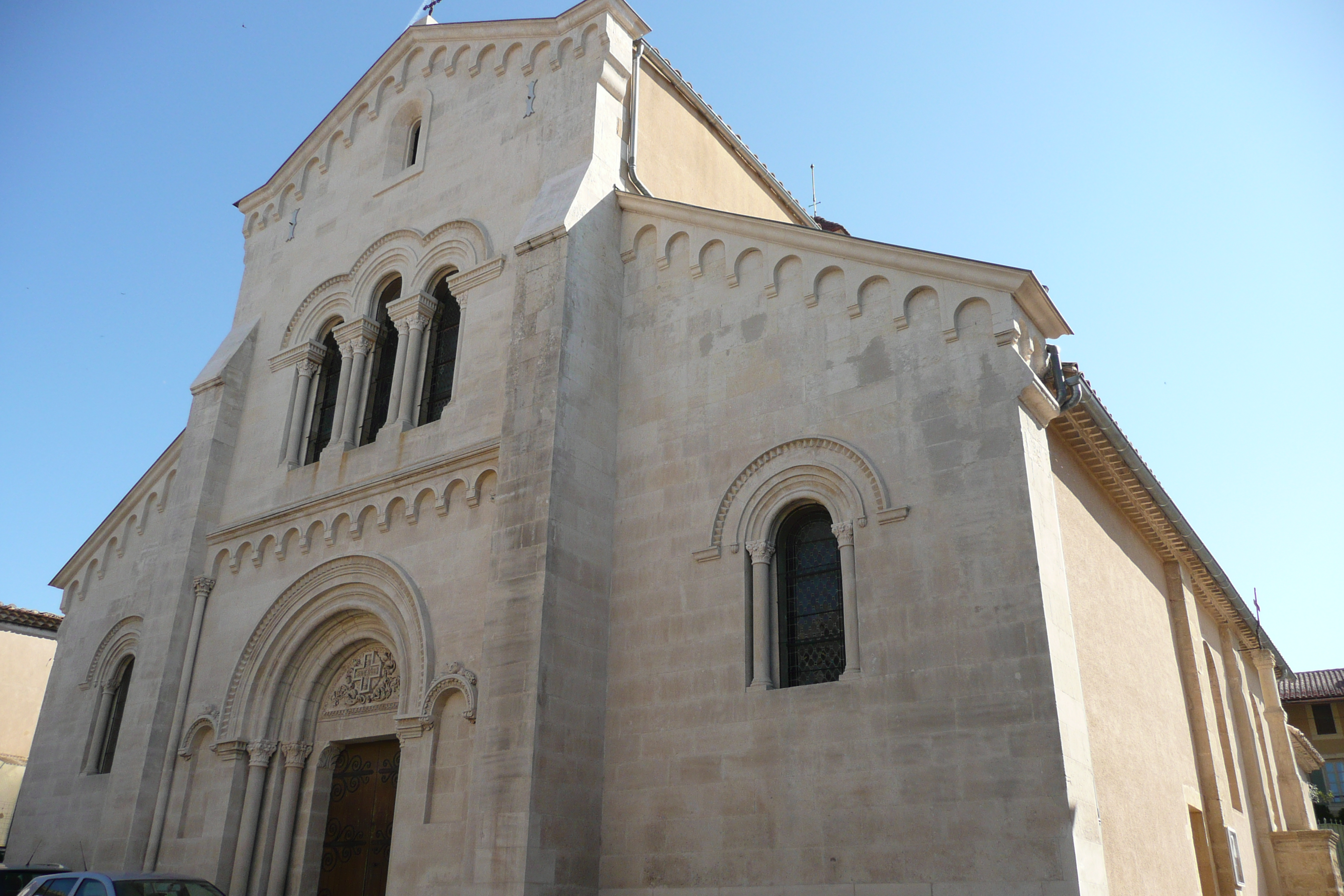 Eglise à Saint-Geniès-de-Comolas.